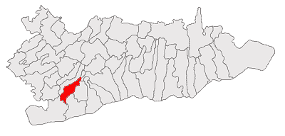 Categorie:Hărţi ale judeţului Călăraşi